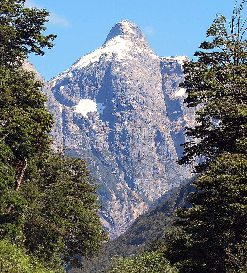 Del Rio Exploradores.